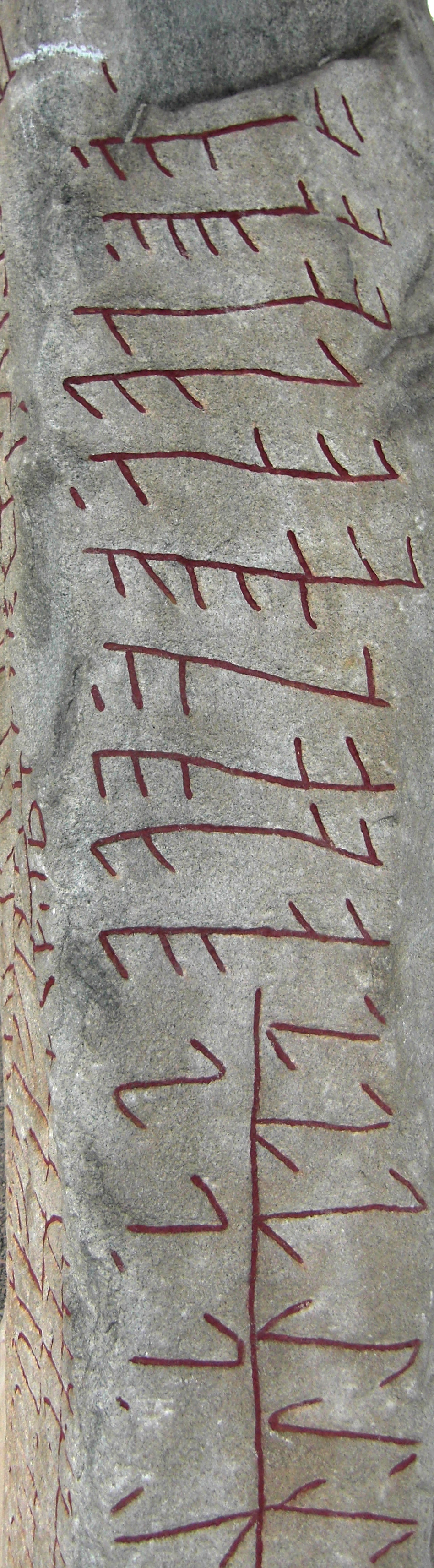 Vänstra smalsidan av Rökstenen (Ög 136, RAÄ-nr Rök 1:1) vid Röks kyrka, Röks socken, Lysings härad, Ödeshögs kommun, Östergötlands län, Östergötland, Sverige.